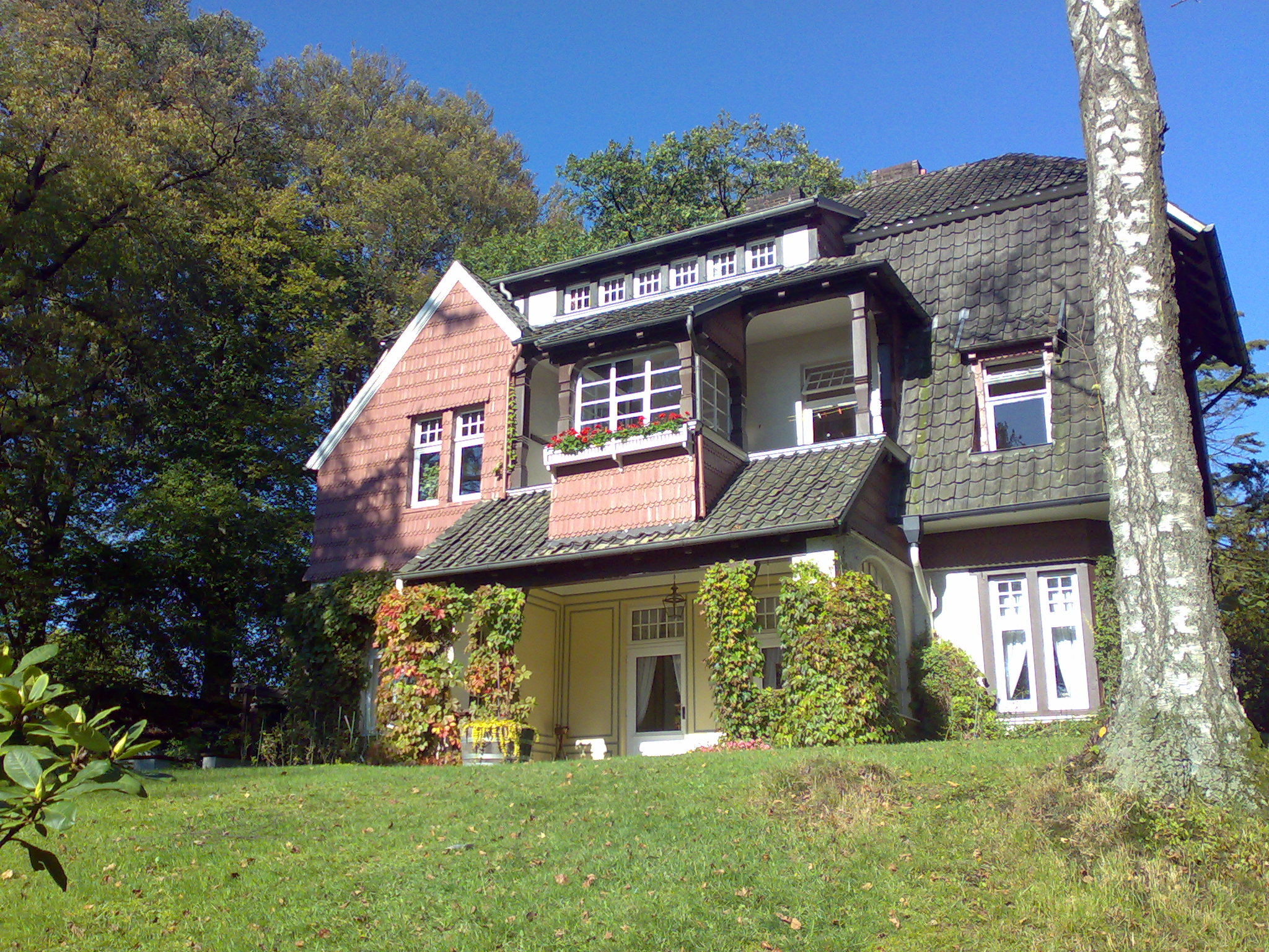 Haus Mindeströmmen in Bremen, Lesmonastraße 70. Das abgebildete Objekt ist ein geschütztes Kulturdenkmal in der Freien Hansestadt Bremen, mit der Nr. 1296 beim Landesamt für Denkmalpflege registriert.